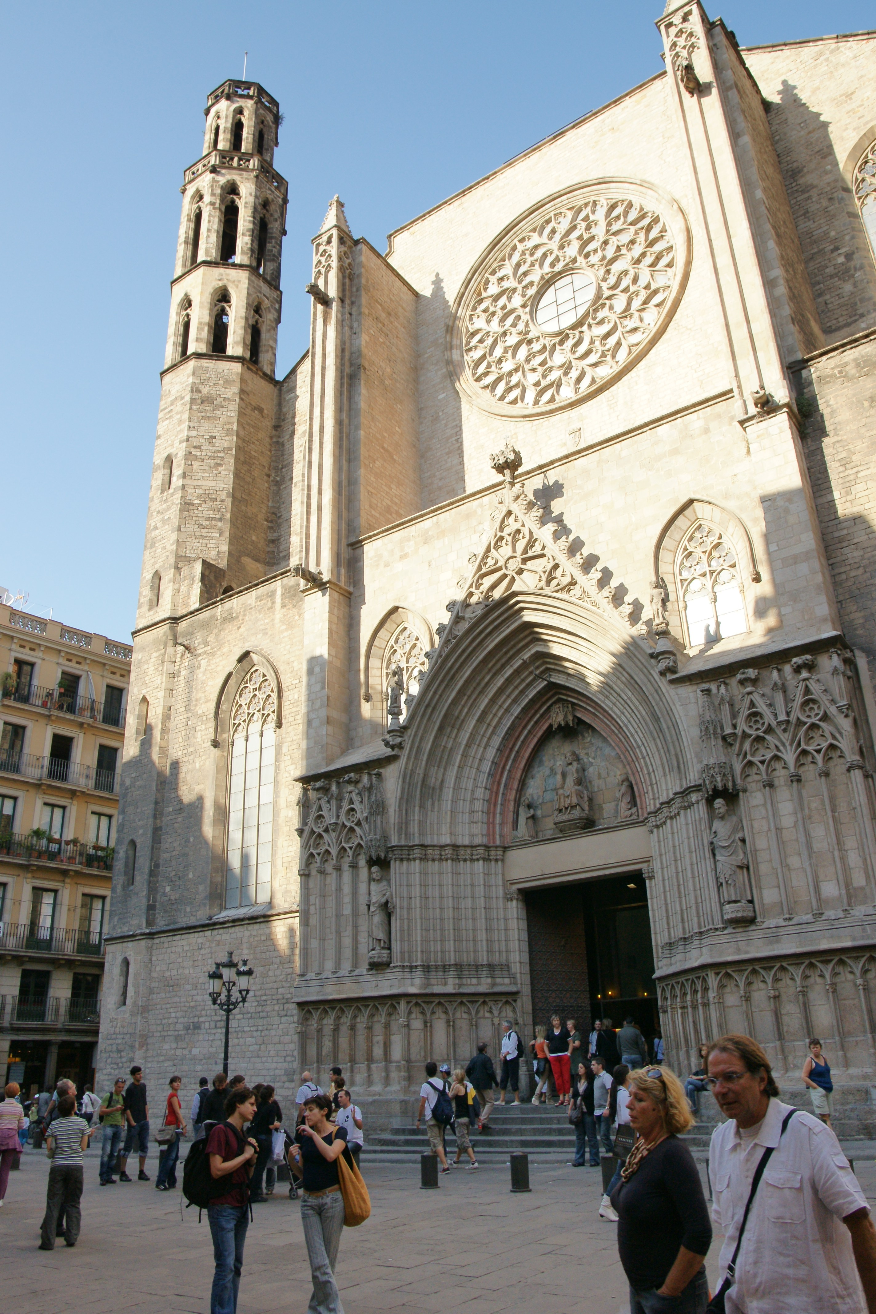 Maßwerk, Rosette über dem Eingangsportal der Santa Maria del Mar in der Nähe des Hafen von Barcelona.